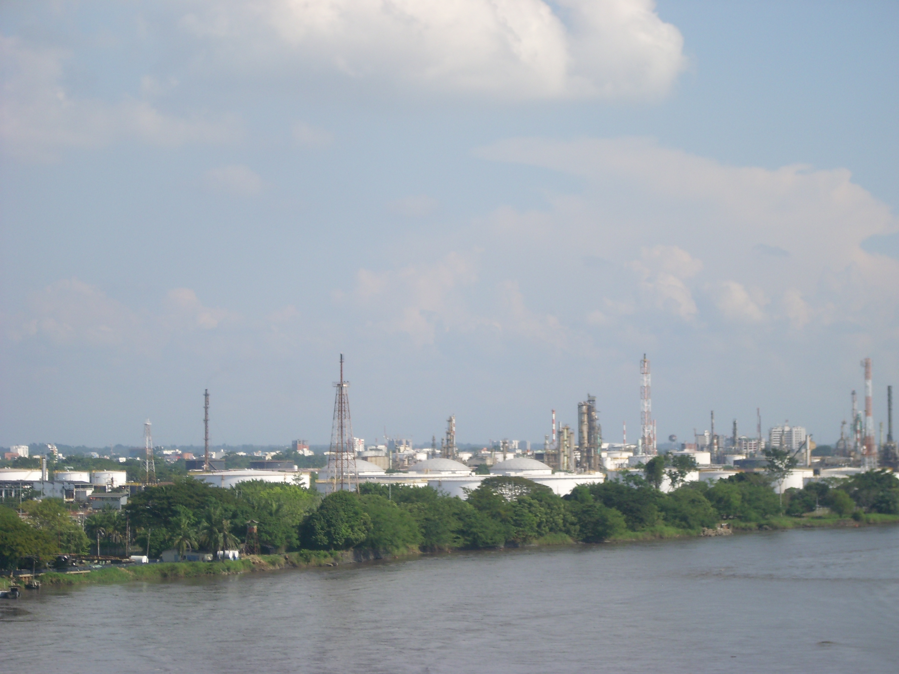 Barrancabermeja, Santander Department, Colombia